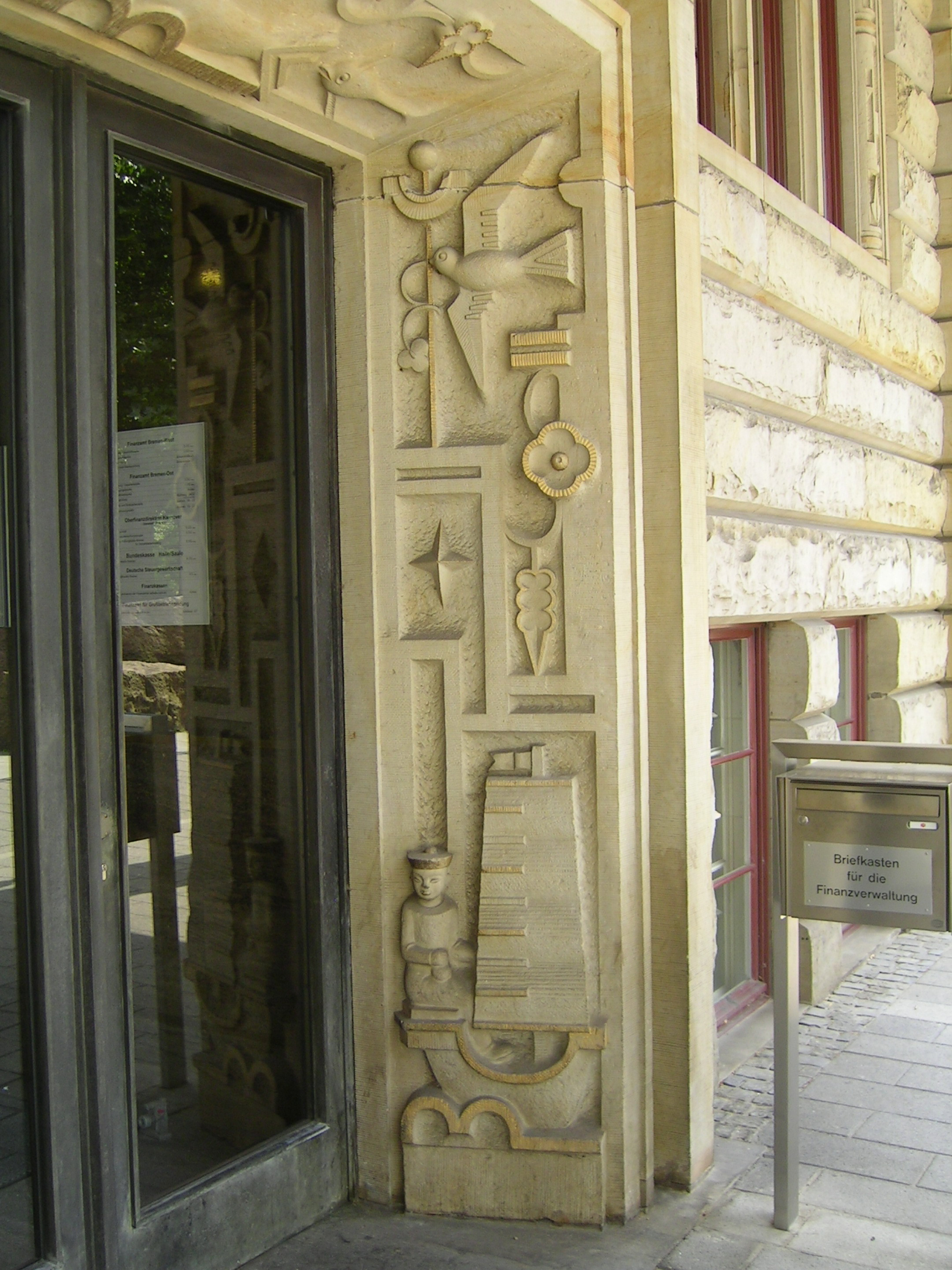 "der senator fur finanzen" building in Bremen City